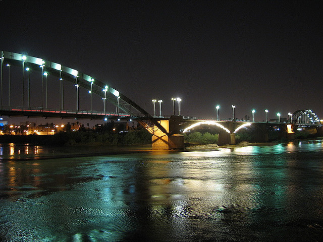 White Bridge over Karun river in Ahvaz, Iran. این عکس در سیزده بدر امسال 1386 از کنار رود کارون در اهواز گرفته شده است